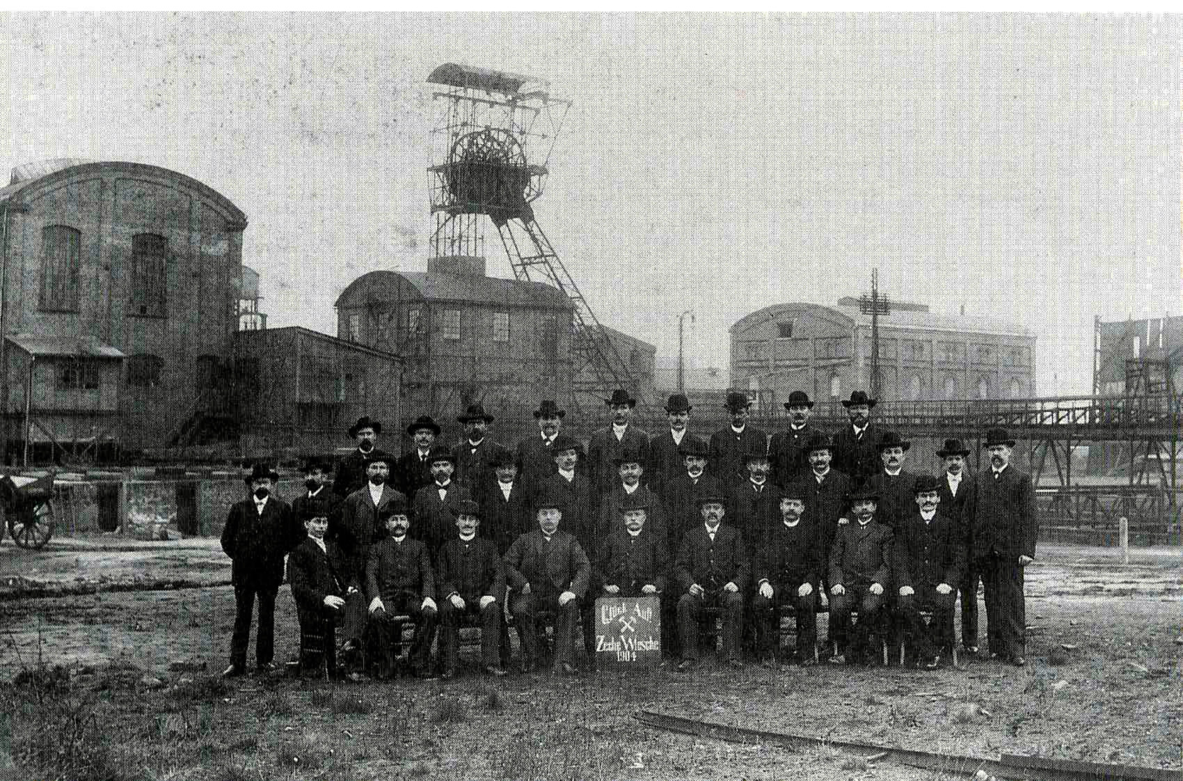 Foto af ejedomsfællesskabet i Wiescheminen